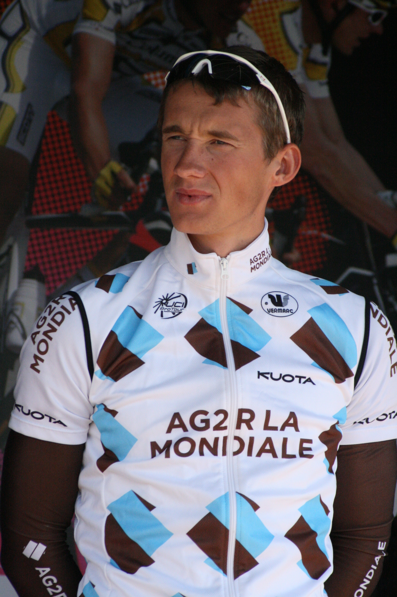 Gatis Smukulis lors de la présentation des équipes des 4 jours de Dunkerque